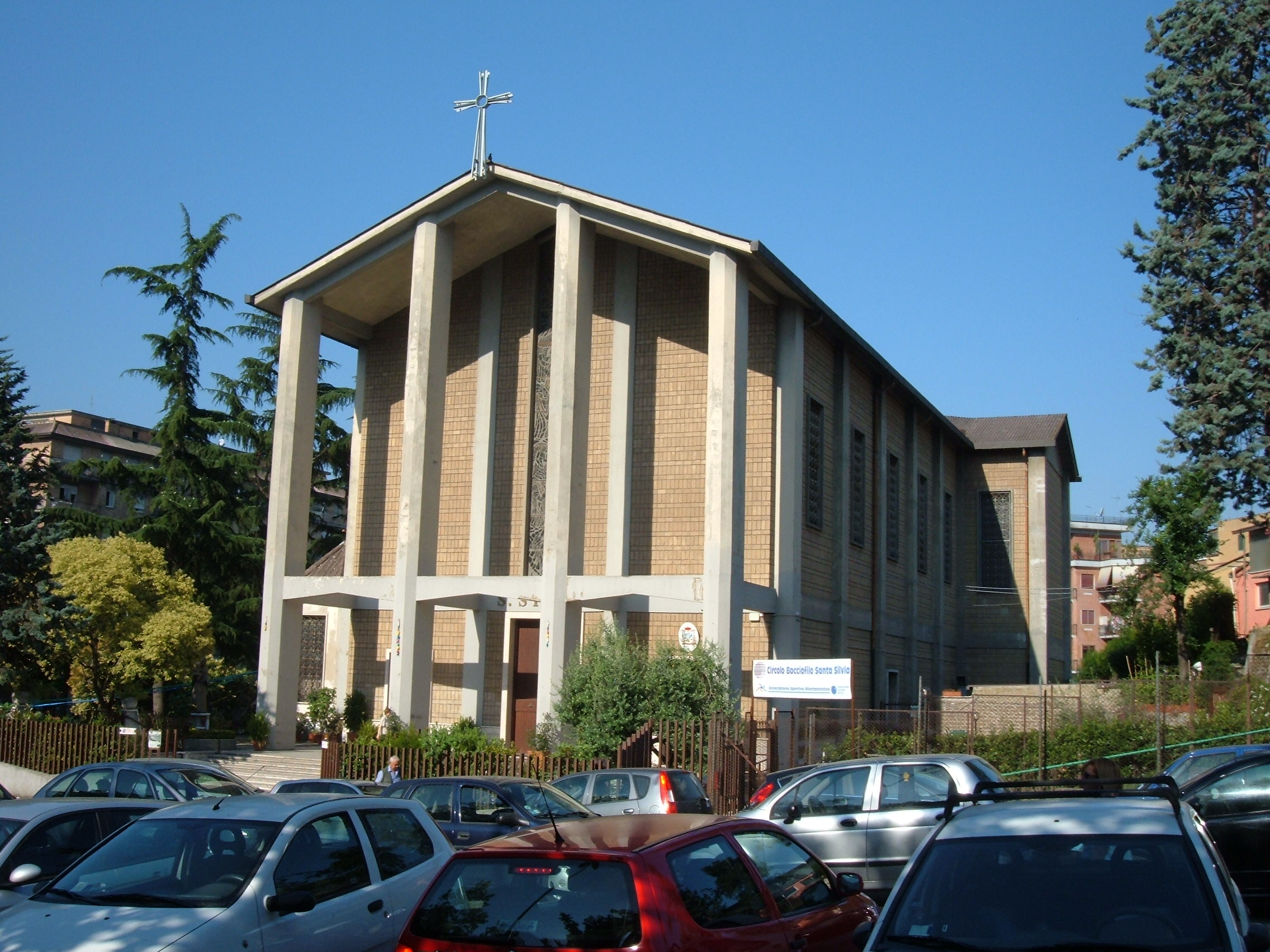 Chiesa di Santa Silvia, a Roma, nel quartiere Portuense.